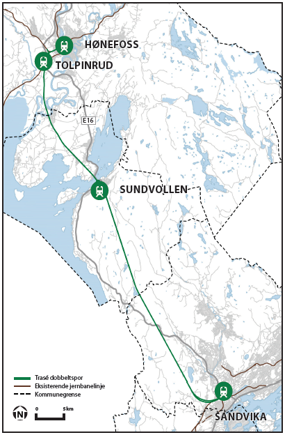 Kart over Ringerriksbanen , utkast pr 2016 før endelig reguleringsplan.